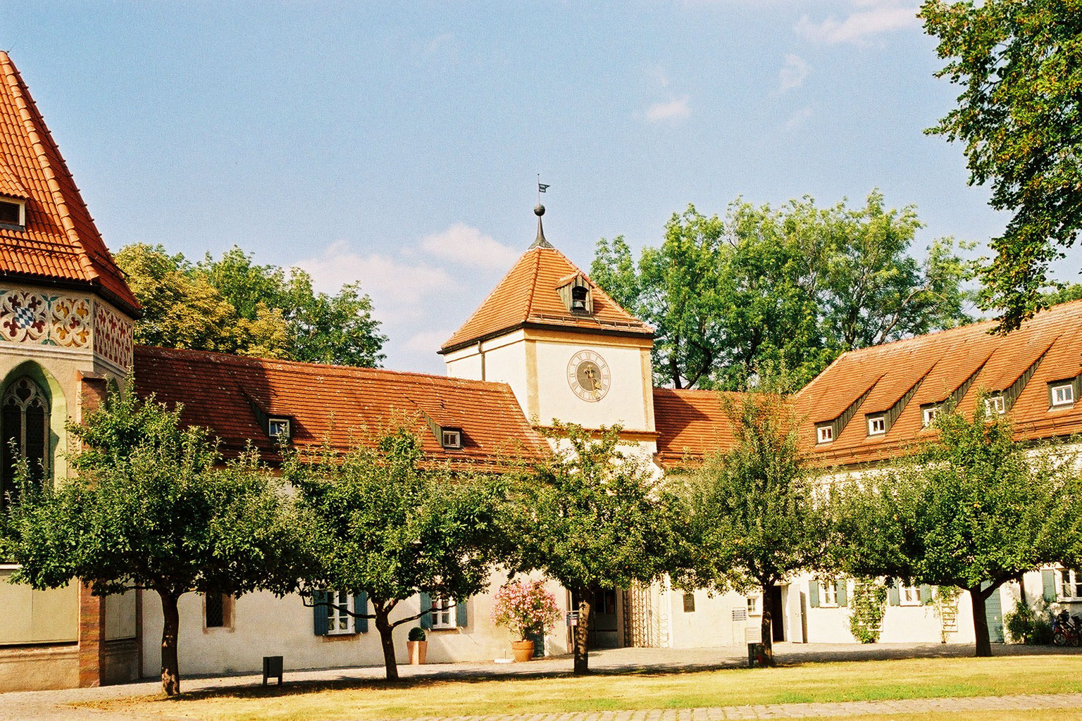 Blutenburg, Munich Inner court